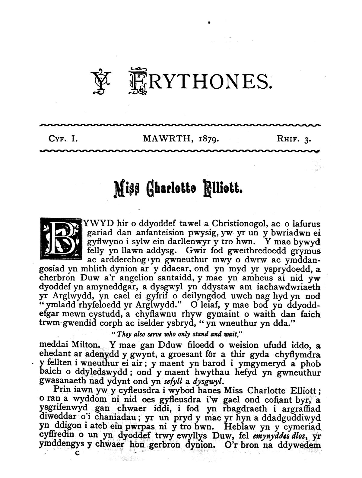 Cylchgrawn crefyddol a chyffredinol misol, Cymraeg ei iaith, i fenywod. Prif gynnwys y cylchgrawn oedd erthyglau crefyddol, ar y teulu ac ar sut i gadw cartref ynghyd a bywgraffiadau o fenywod amlwg, barddoniaeth a cherddoriaeth. Golygwyd y cylchgrawn gan yr ysgolfeistres a bardd, Sarah Jane Rees (Cranogwen, 1839-1916). Teitlau cysylltiol: Cyfaill yr Aelwyd a'r Frythones (1892).